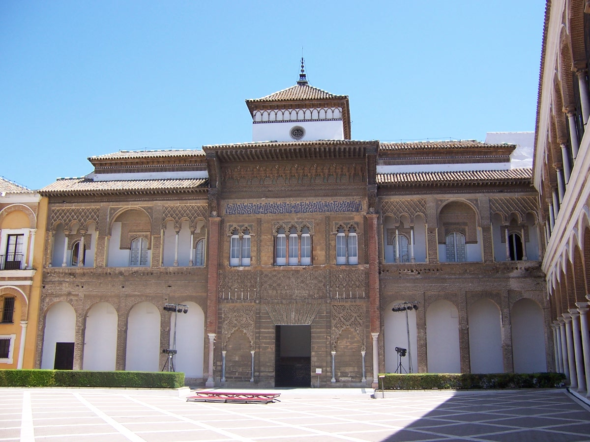 Palacio de Pedro I en el Alcázar de Sevilla Alcázar de Sevilla camera: Kodak DX7440 Source: *Daniel Csorfoly